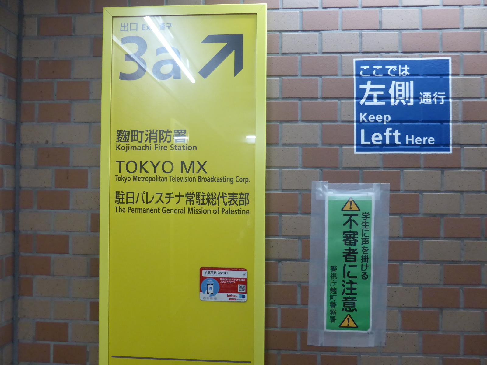 駐日パレスチナ代表部の最寄り駅は半蔵門駅3a